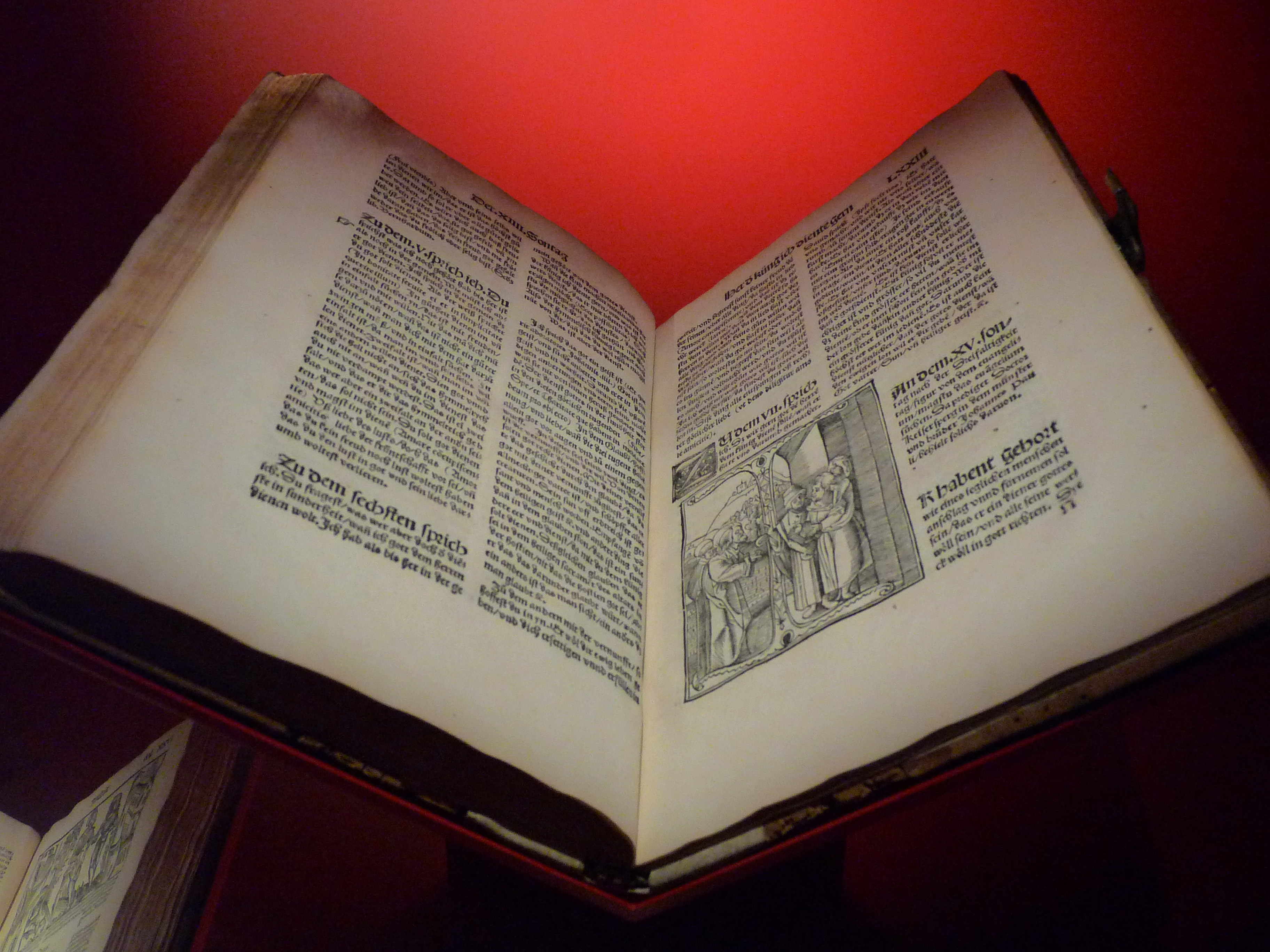 Musée historique de Strasbourg : Die Emeis, sermons de carême de Jean Geiler, 1516